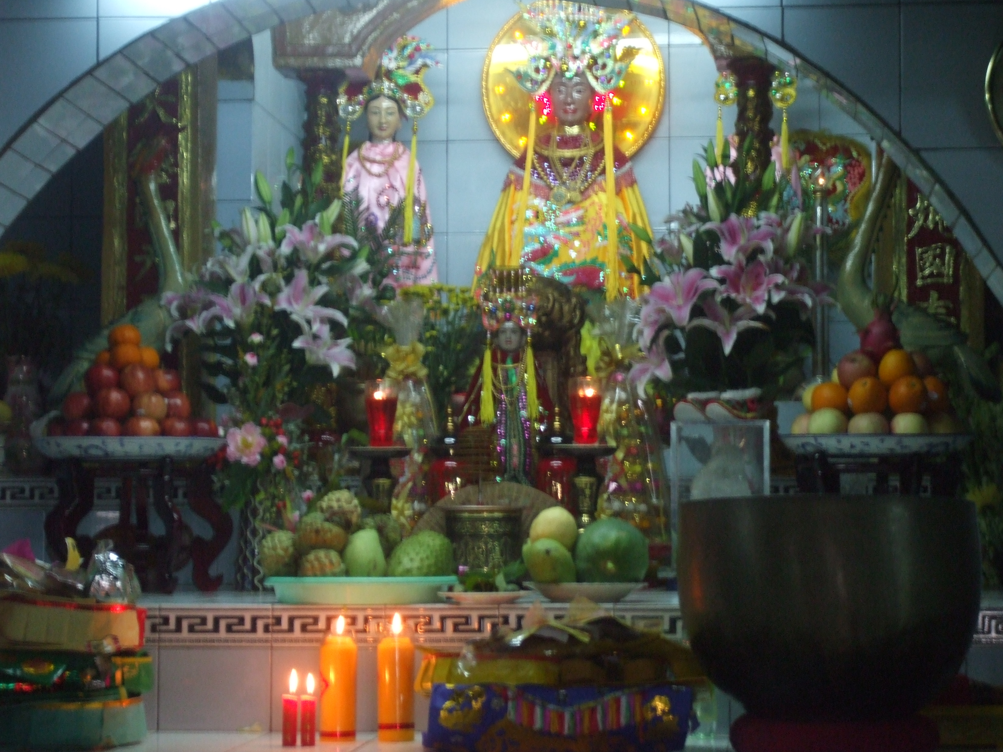 Nơi thờ và tượng Bà Đen tại núi Bà Đen, Tây Ninh, Việt Nam. (Tượng Bà Đen nhỏ, chỉ cao khoảng 0.6m, ngang khoảng 0.3m)